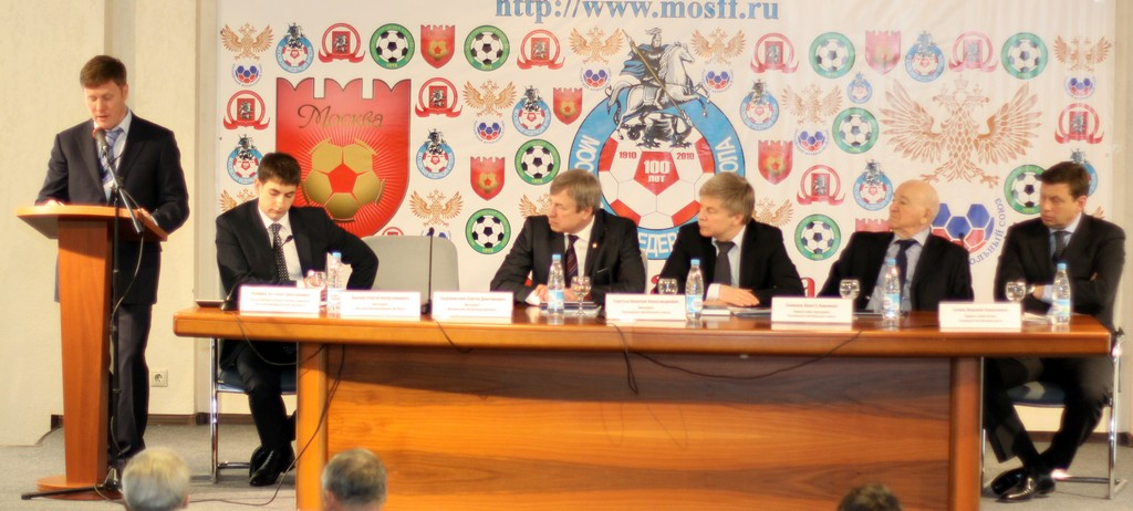 Очередная конференция МФФ выбирает президента